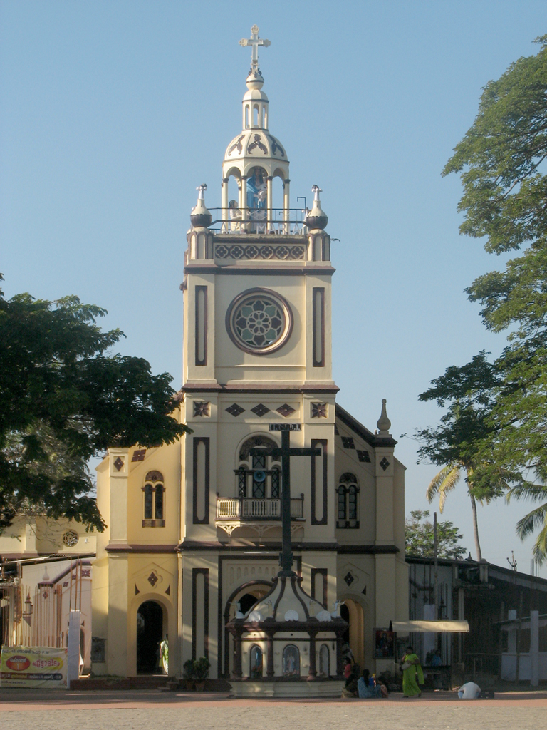 Vallarpadam Church, Kerala,India